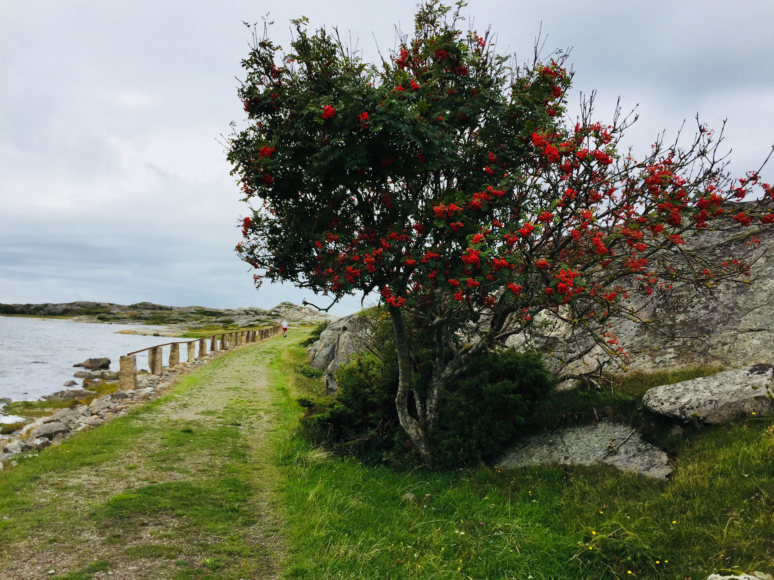 En gammal väderbiten rönn på Lindö